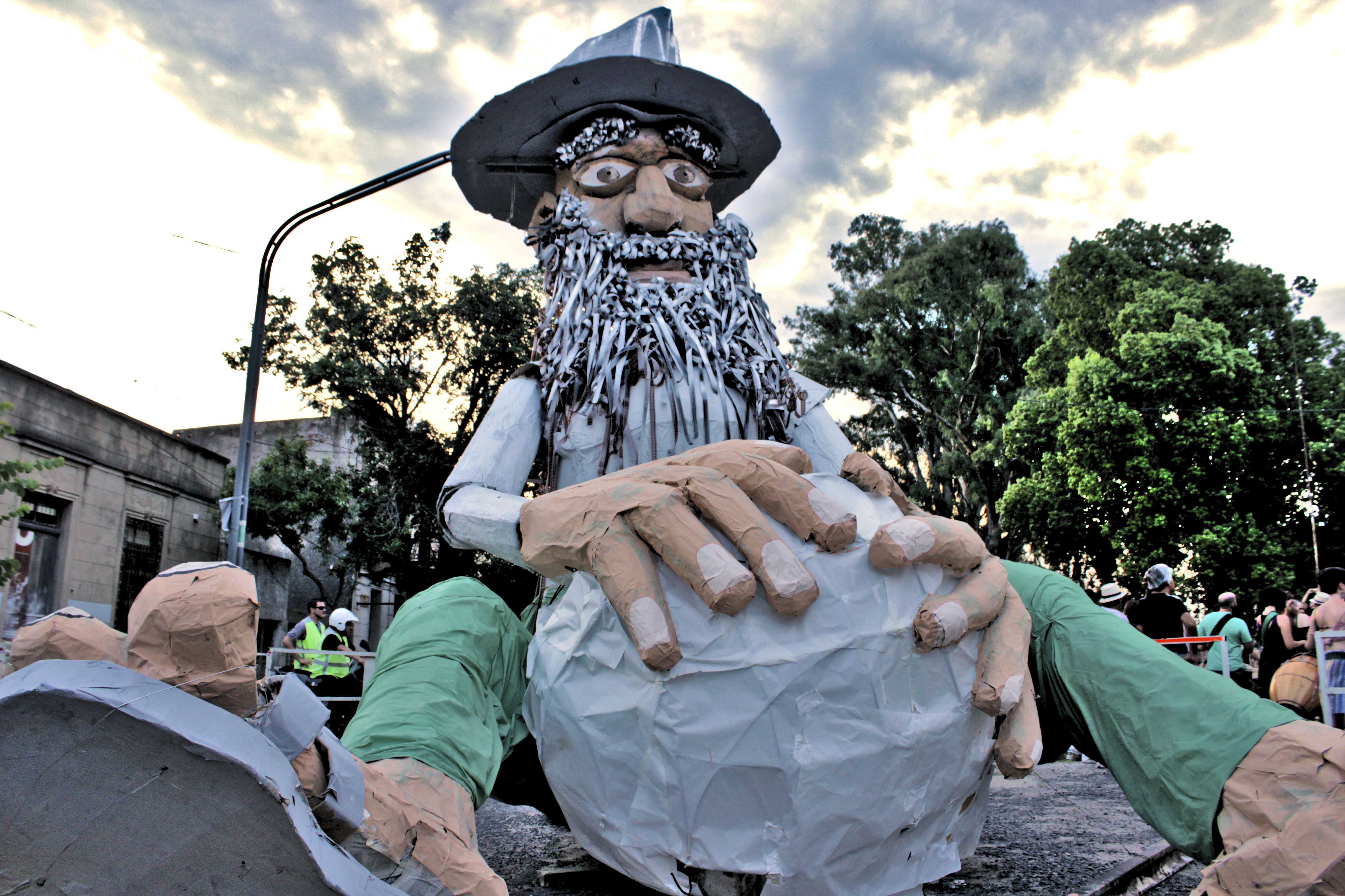 Rey Momo representando a Fernando Birri en el Carnabarrial 2018, organizado por el Centro Social y Cultural El Birri. El primer festejo luego del fallecimiento del cineasta.